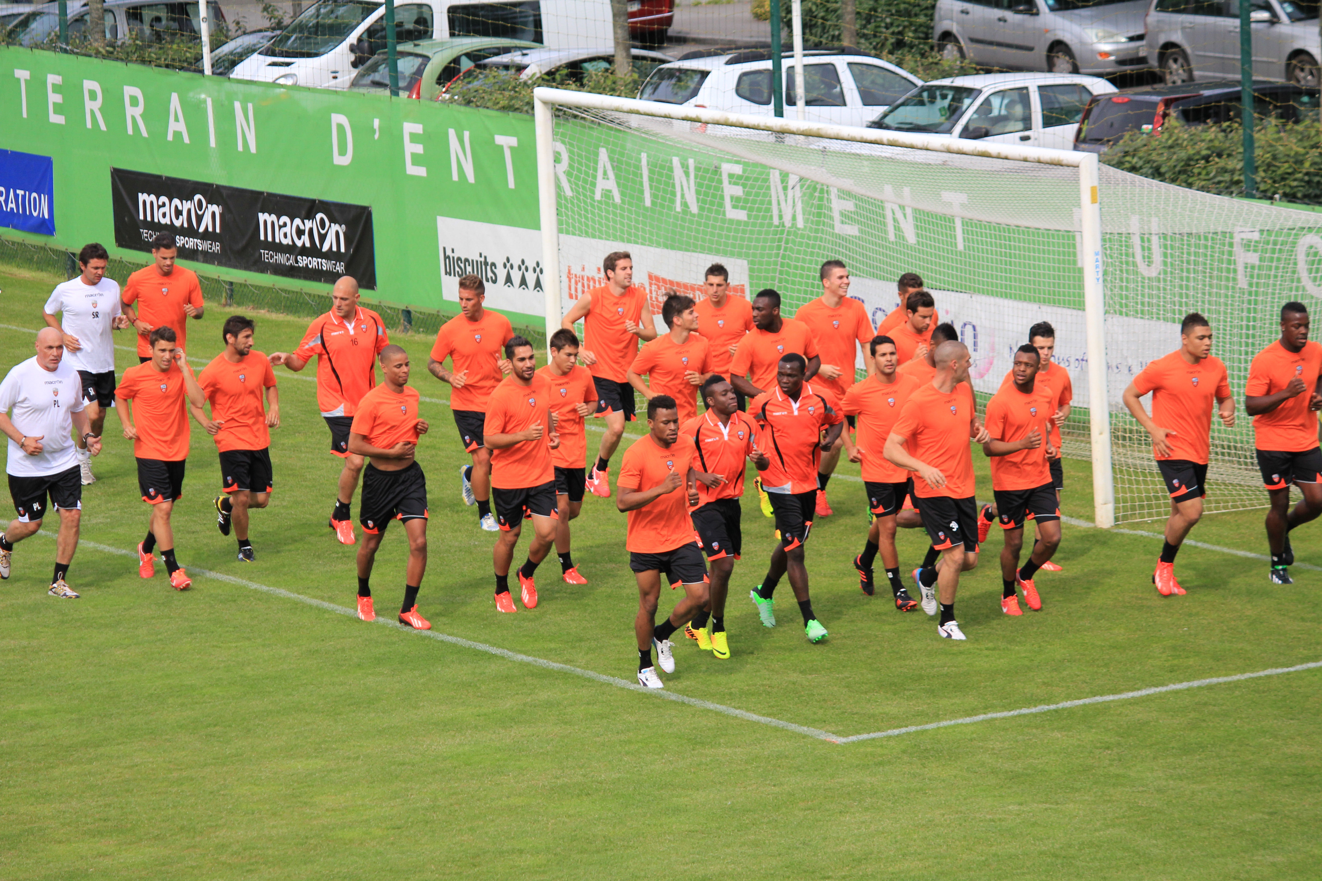 Ensemble de l'équipe lors de la reprise de l'entrainement du FC Lorient le 27 juin 2013